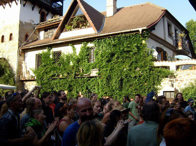 Skalákův mlýn